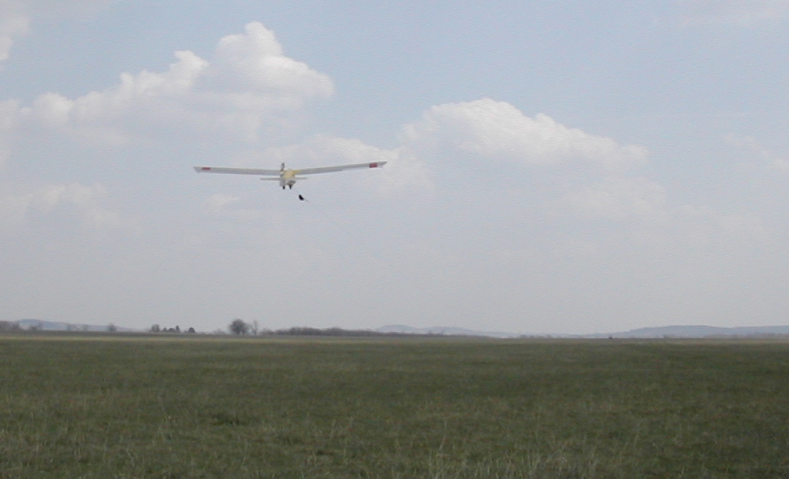 R–26 Góbé csörlés közben (Dunakeszi)